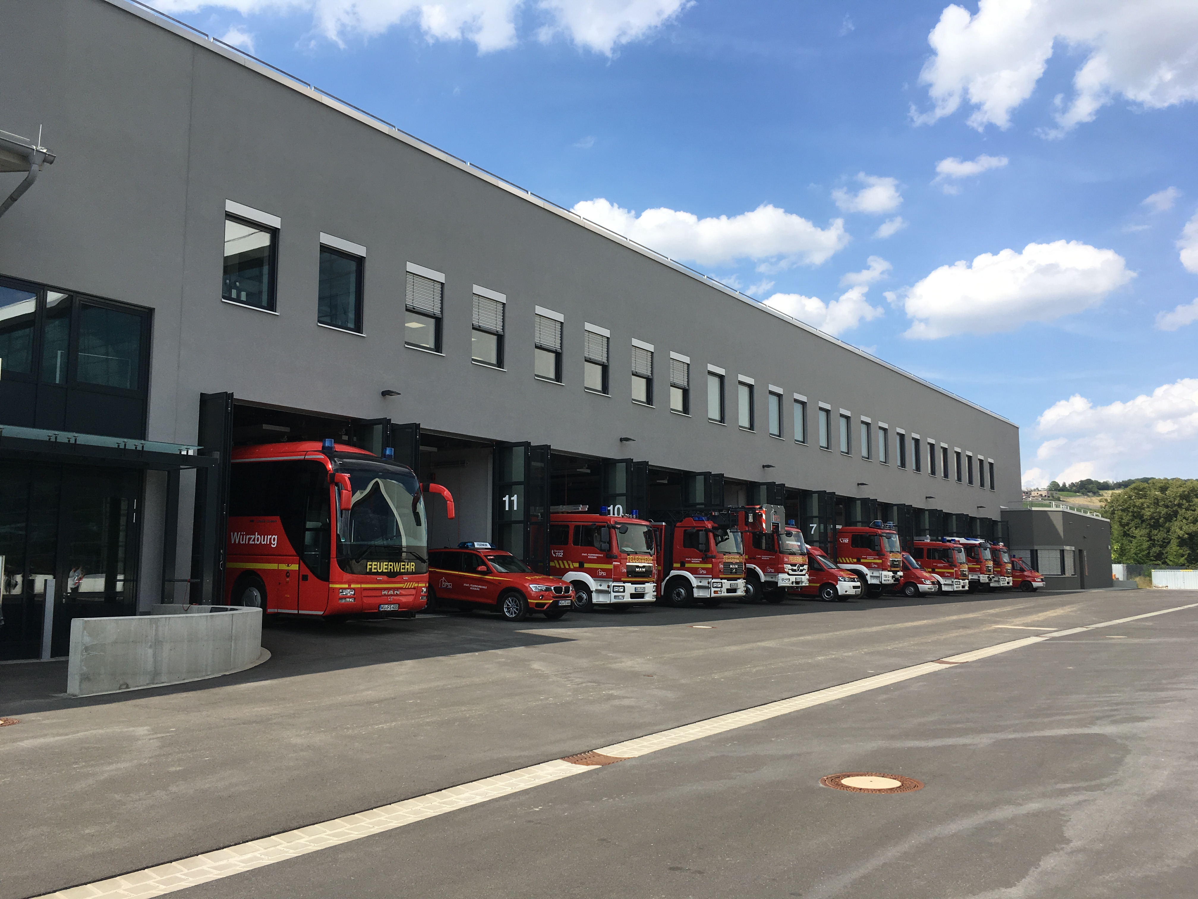 Das Bild zeigt das Gebäude F (schulintern als Feuerwache bezeichnet)